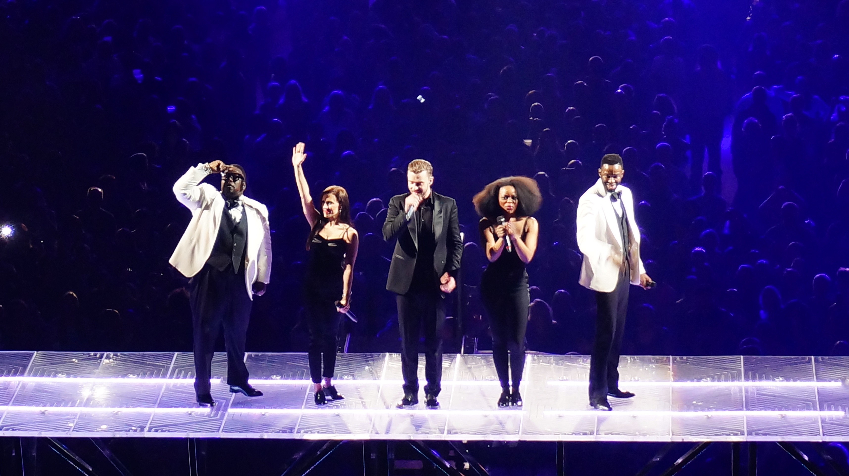 El concierto de Justin Timberlake en el Verizon Center de Washington DC, como parte de su gira mundial The 20/20 Experience World Tour.